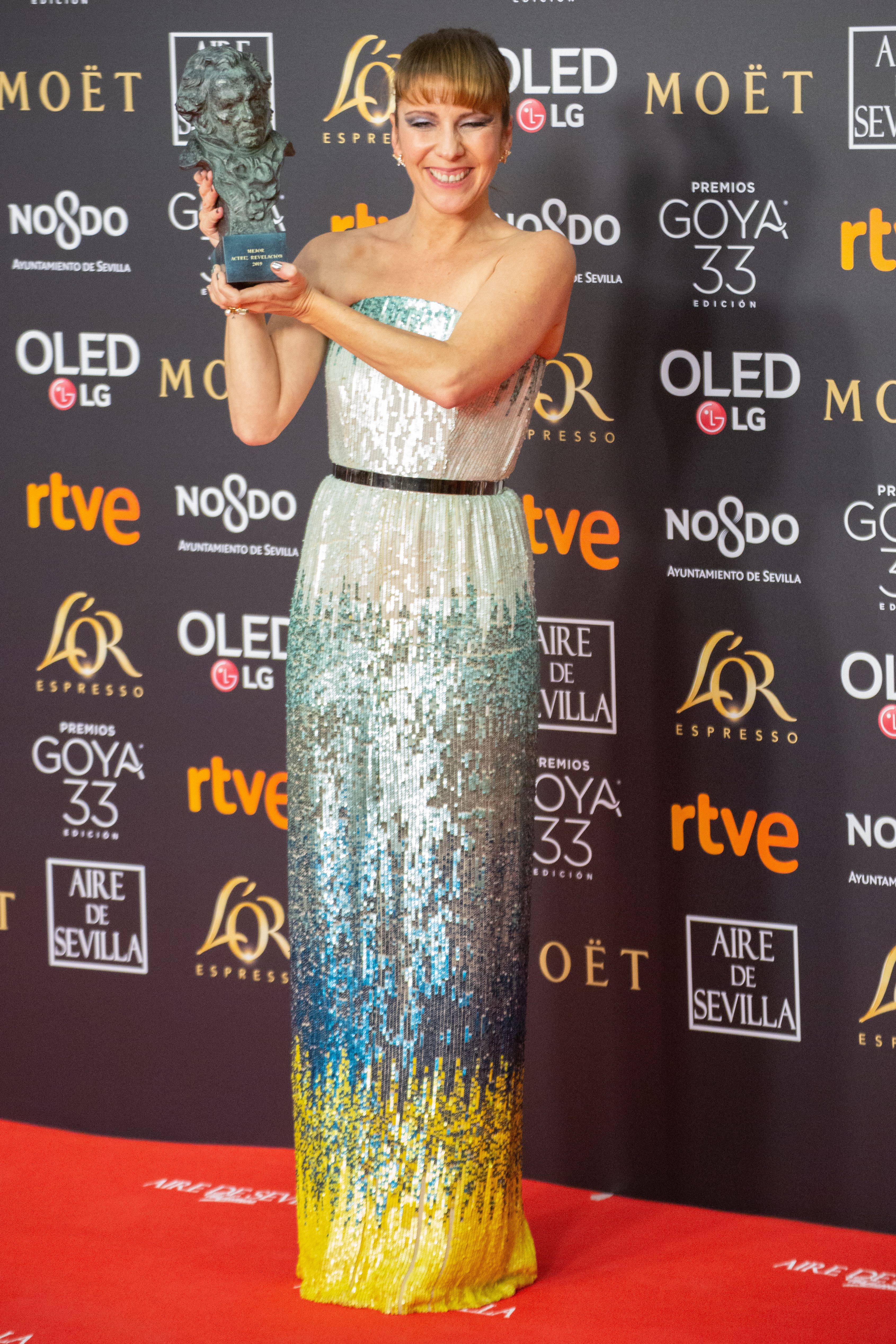 Premio Goya 2018 a la Mejor Actriz Revelación por el papel de Violeta en "Quién te cantará"